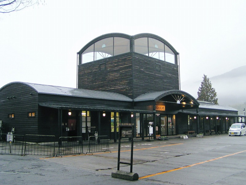 2005年3月28日に投稿者が由布院駅にて撮影。